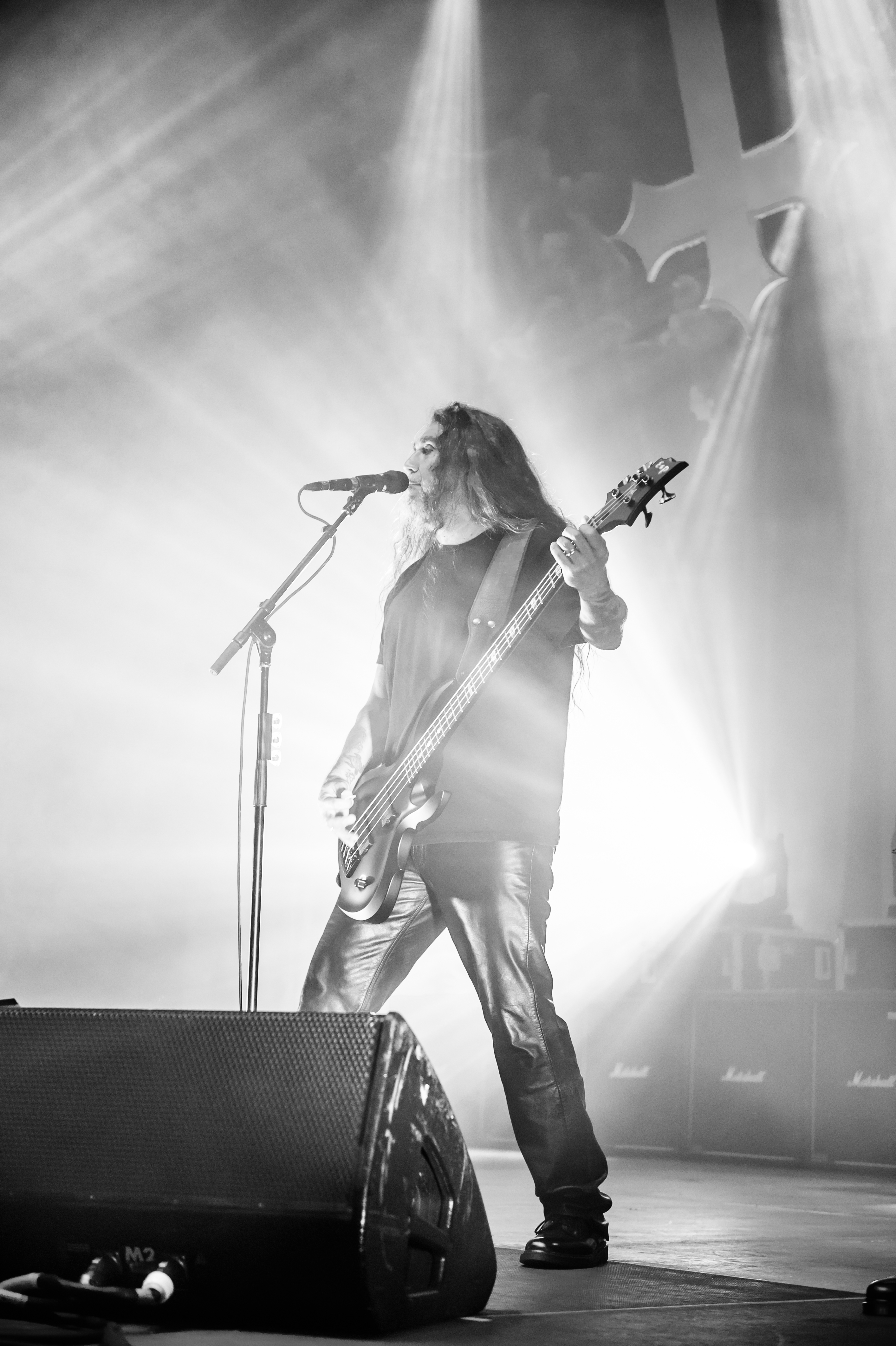 'Slayer Tour 2015 Bochum'